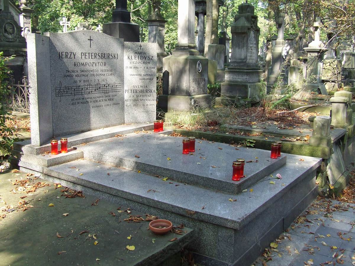 Jerzy Petersburski, grób, Stare Powązki